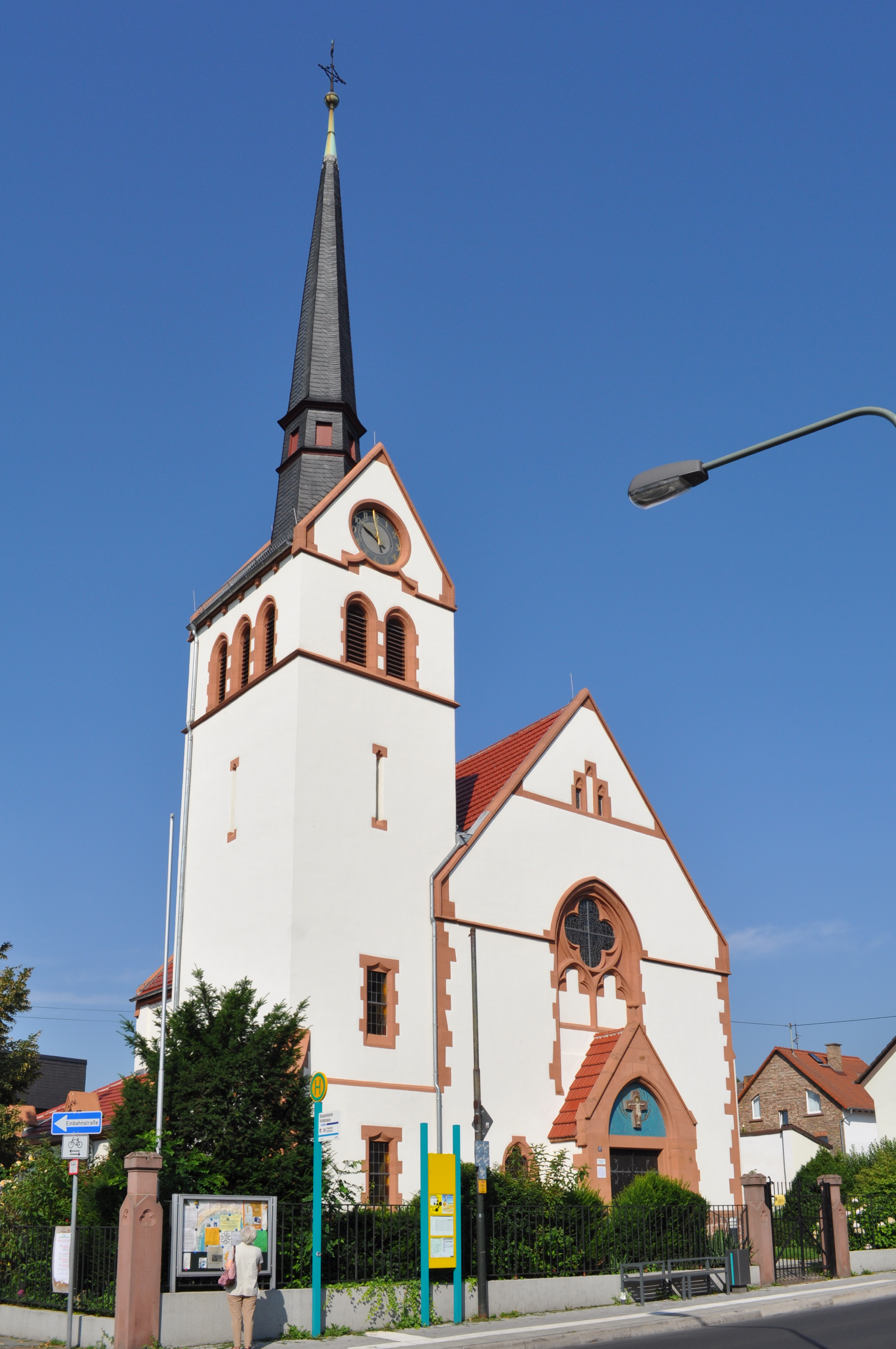 Evangelische Kirche in Sossenheim. Das denkmalgeschützte Haus wurde ab 1897 erbaut.